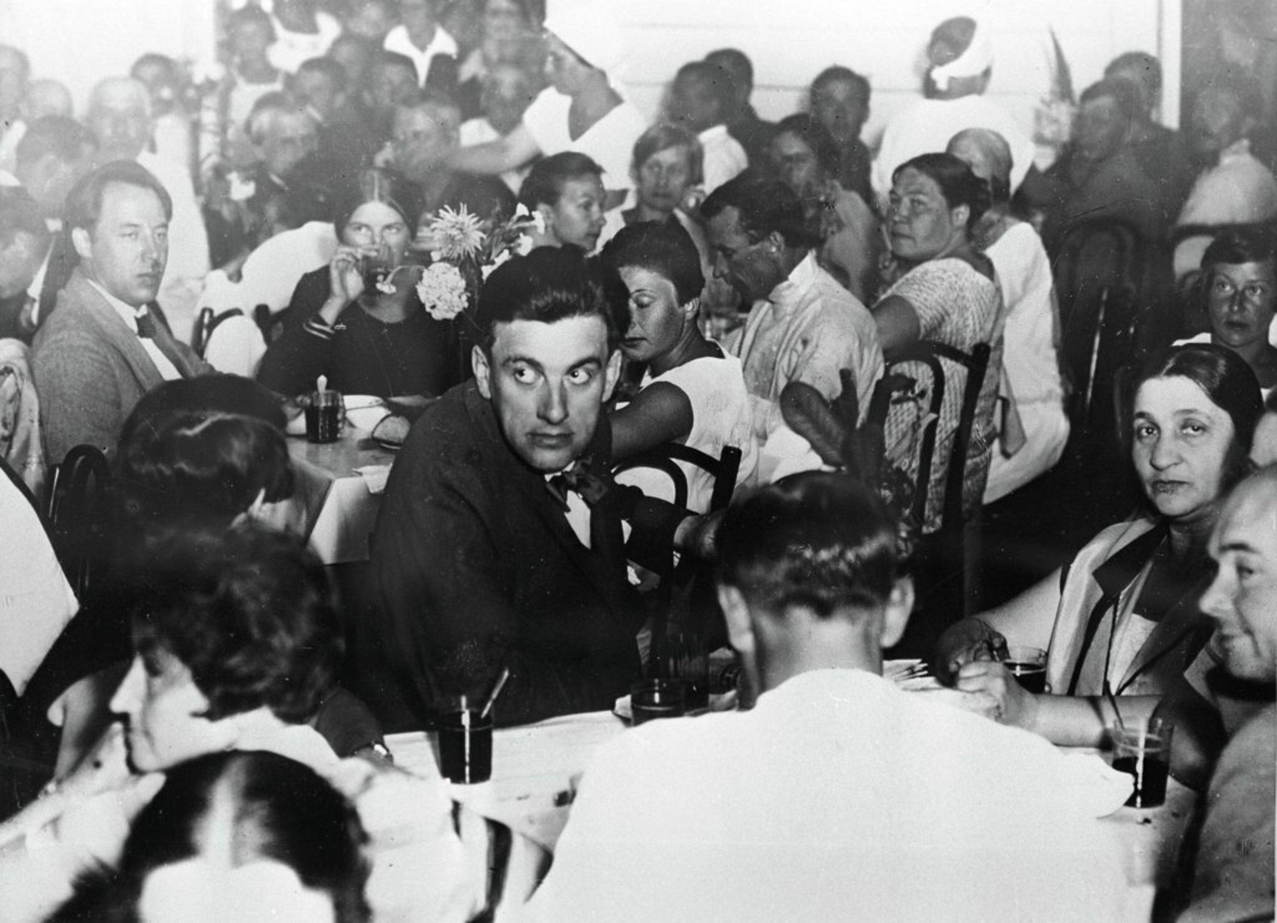 Владимир Маяковский в доме отдыха РАБИС (Дом отдыха Союза работников искусств), Сочи, 1929 год. Из коллекции Музея истории города-курорта Сочи. Архивный номер: МИГКС НВФ-1749.